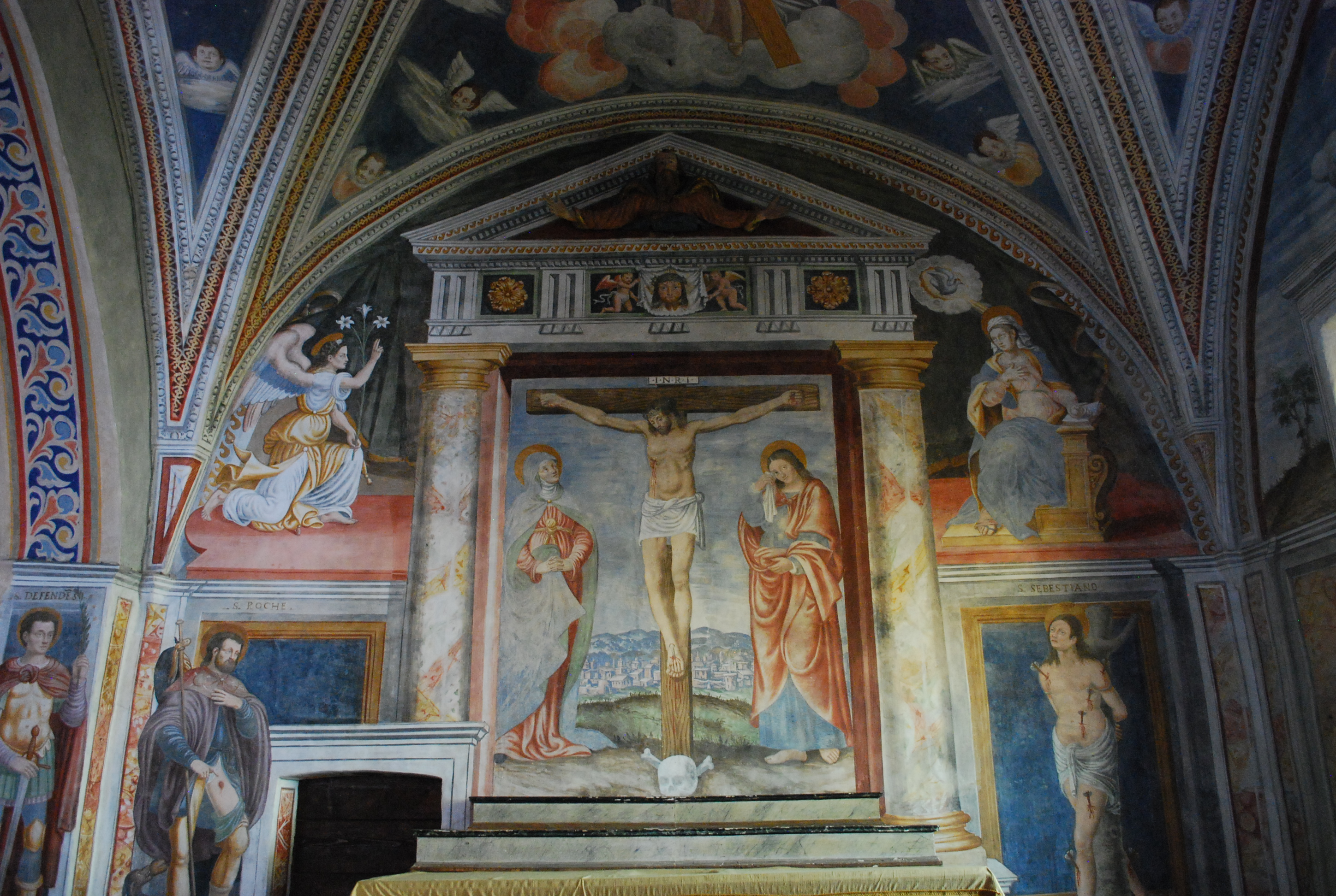 Chiesa vecchia di Belgirate NO - interni